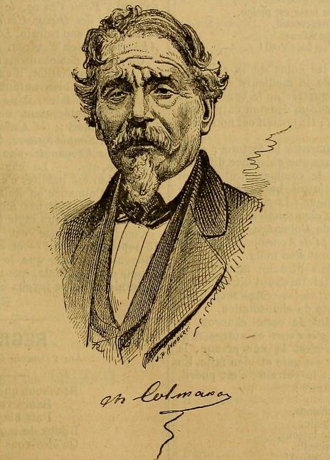 Portrait du goguettier Charles Colmance.